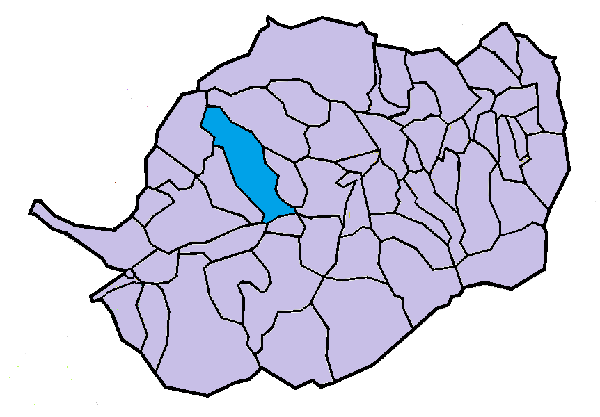 Oleta i Èvol en el Conflent, a partir del mapa municipal del Conflent de lliure disposició adaptat al Nomenclàtor toponímic aprovat el 2007